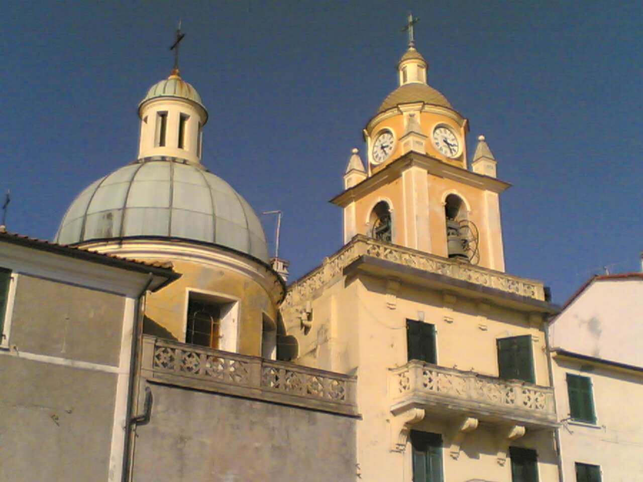 La Chiesa di San Terenzo